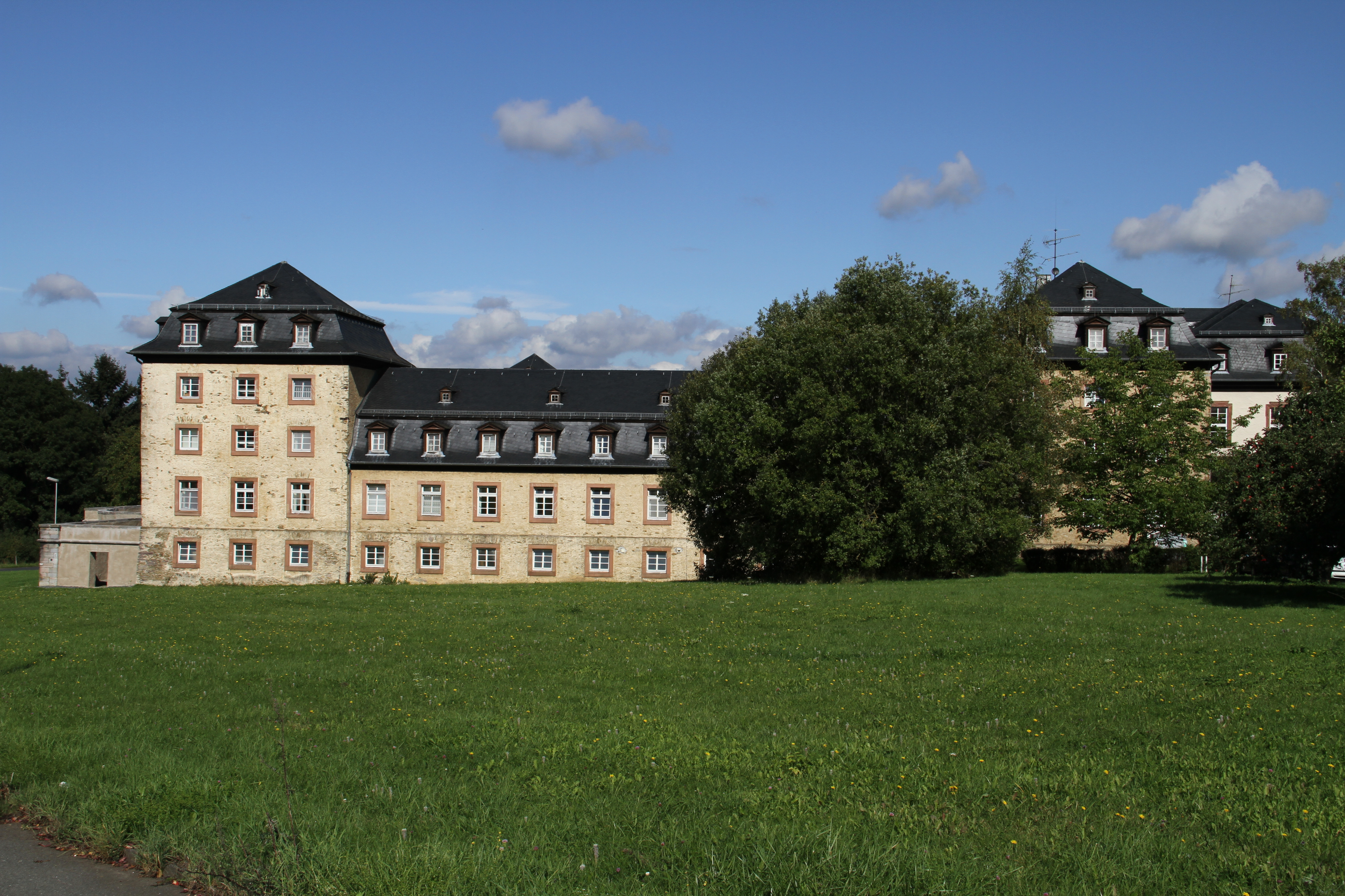 Windhof in Weilburg Dieses Foto entstand im Rahmen des Projekts Wiki Loves Monuments Mittelhessen, das aus dem Community-Projektbudget von Wikimedia Deutschland e. V. gefördert wurde.